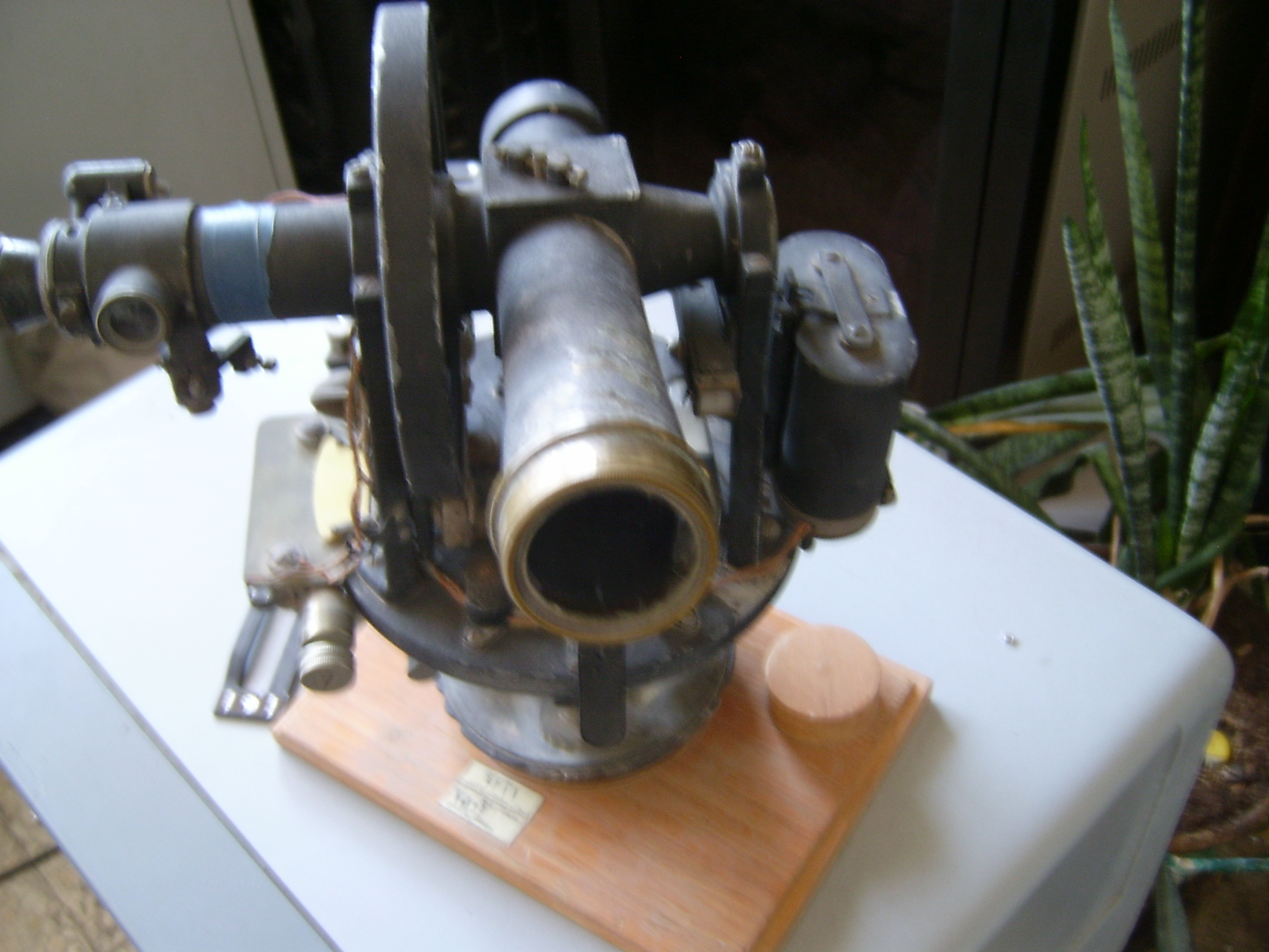 تئودولایت برای تعقیب بالون پایلوت هواشناسی به منظور به دست آوردن سرعت و سمت باد لایه های بالایی جوّ و ارتفاع کف ابر